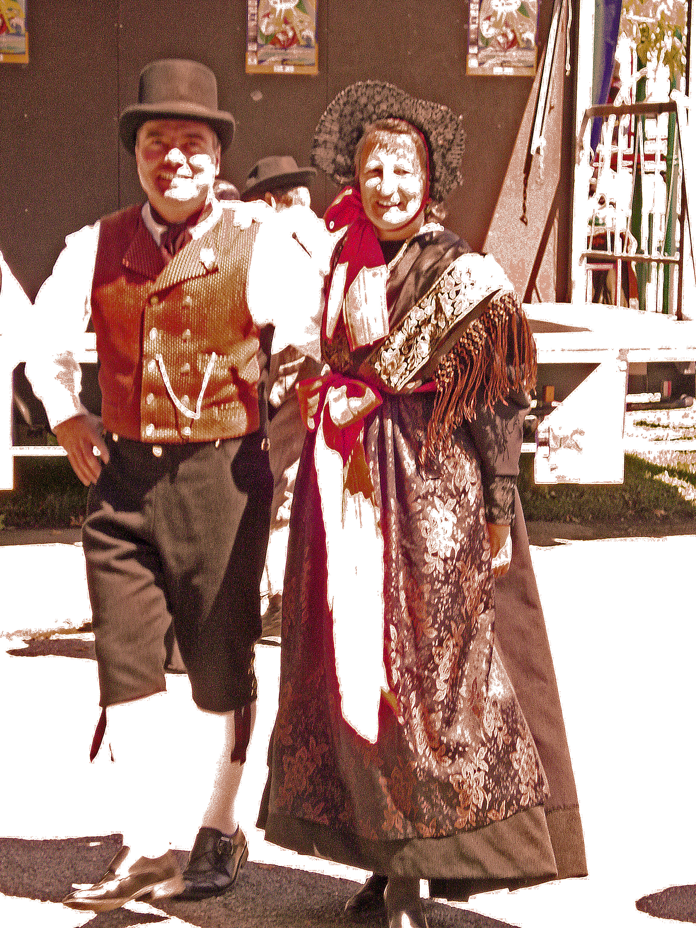 Festival du lac à Aix-les-Bains